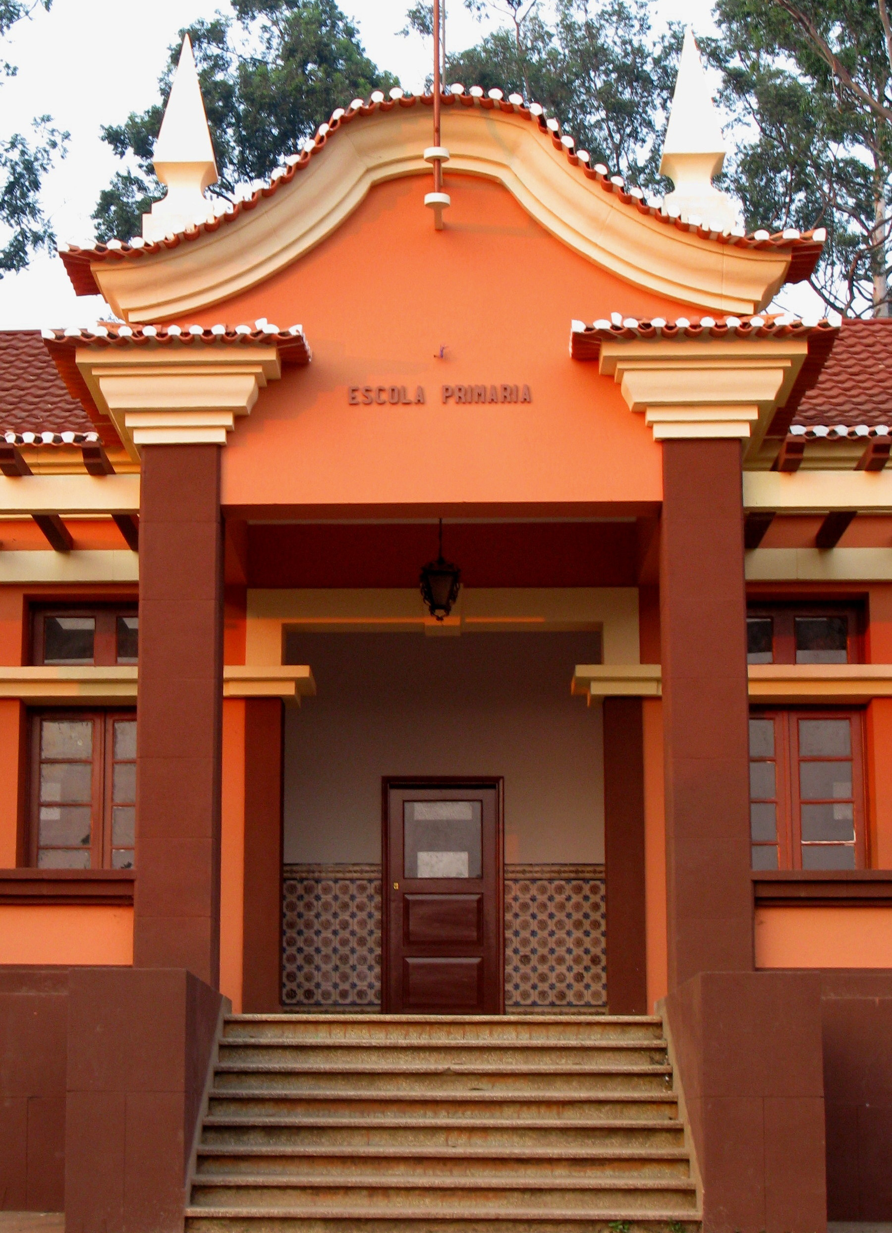 Waku Kungo, Angola